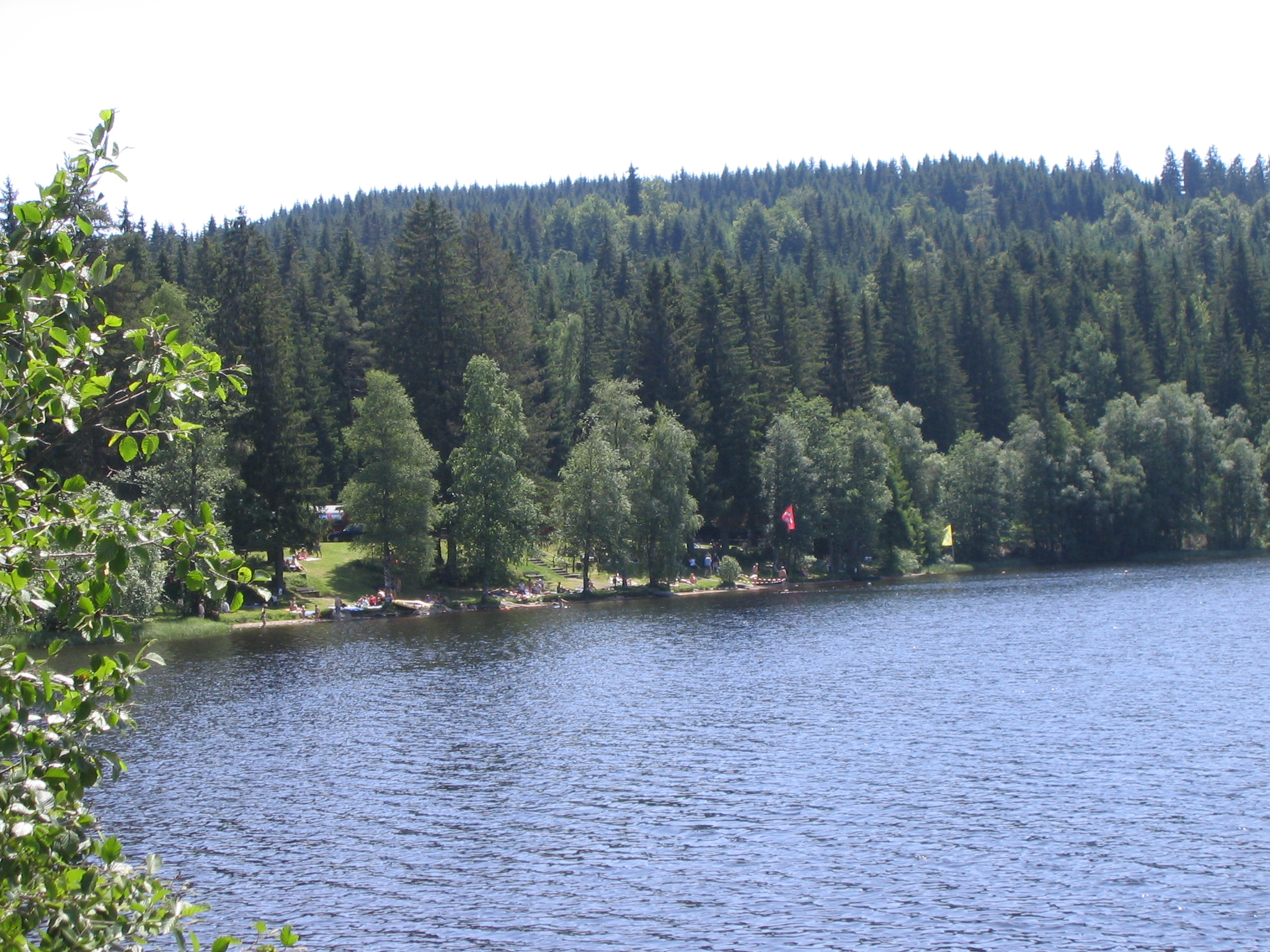 Windgfällweiher, Gemeinde Feldberg, Baden-Württemberg, Deutschland